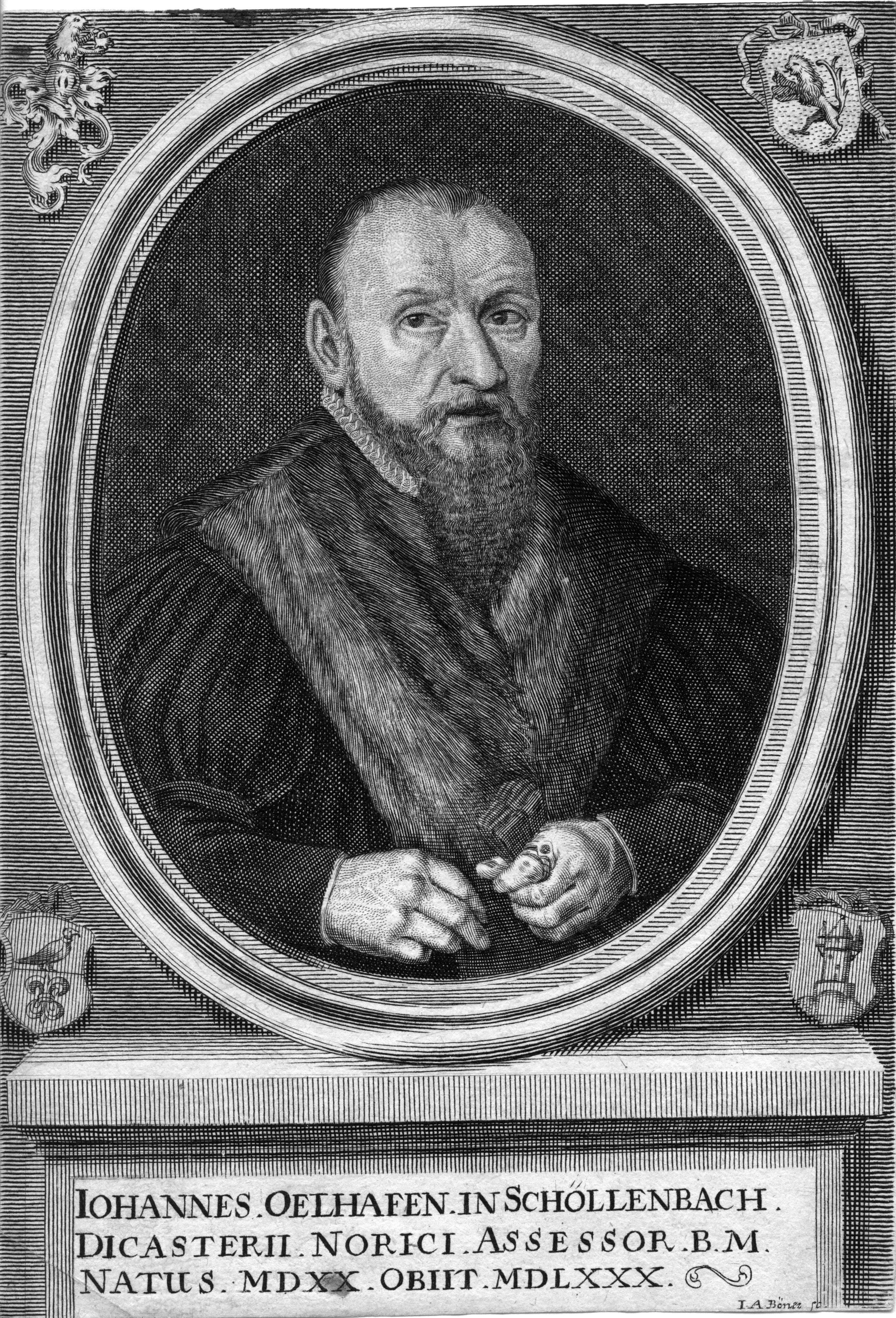 portrait gravé